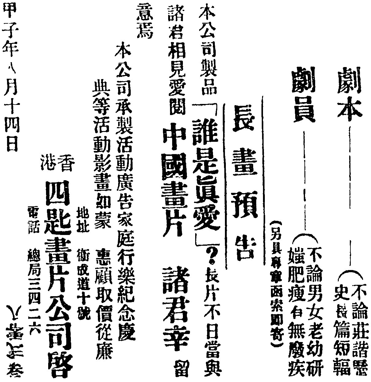 中文（香港）: 位于香港衛城道十號『四匙畫片公司』在農曆甲子年八月十四日（1924年9月12日，星期五）在報紙刊登招募演員啟事。不論男女、老幼、妍媸、肥瘦，有無廢疾。